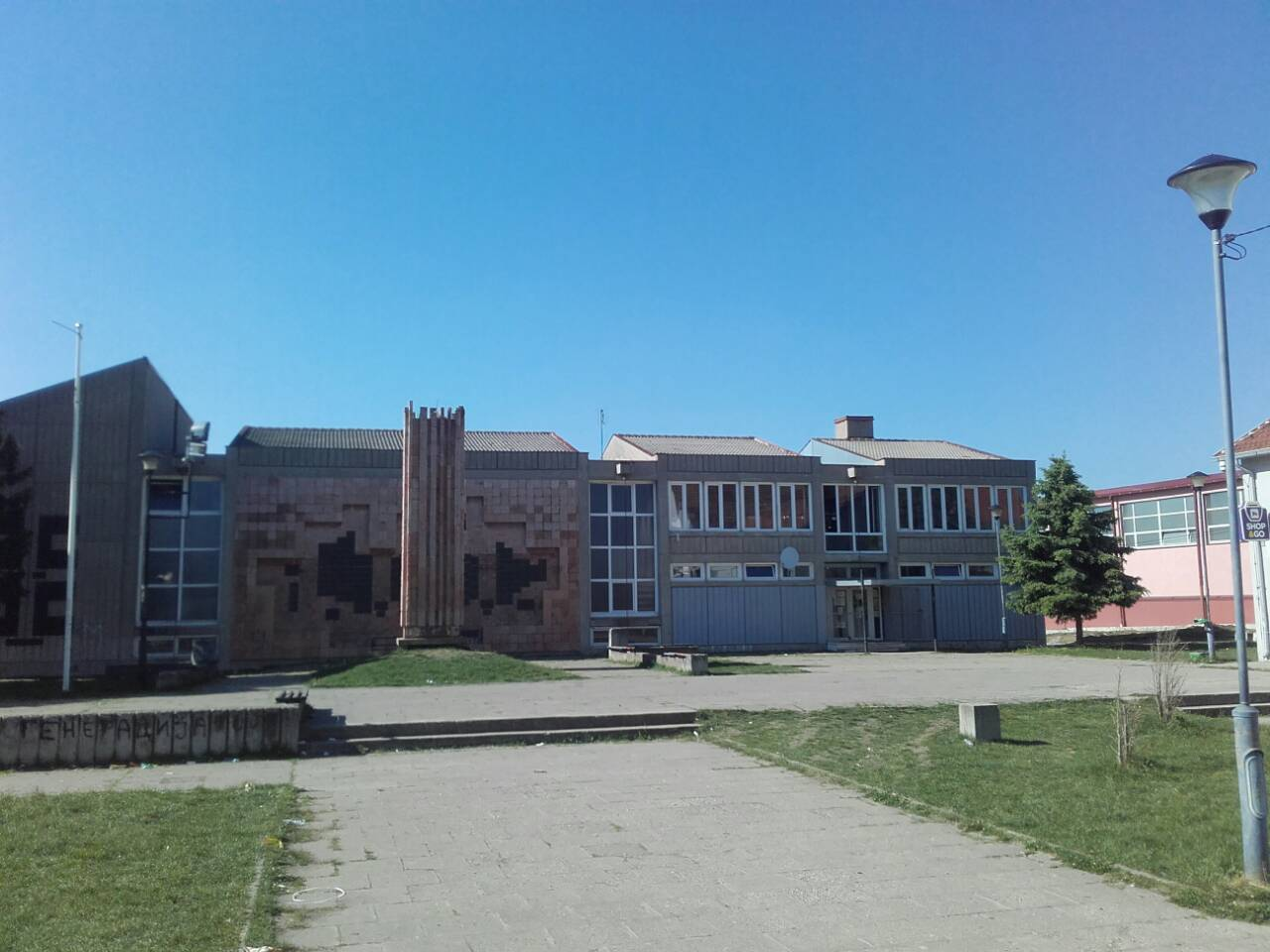 Pogled na Spomen dom u Vraniću - pogled sa prednje strane